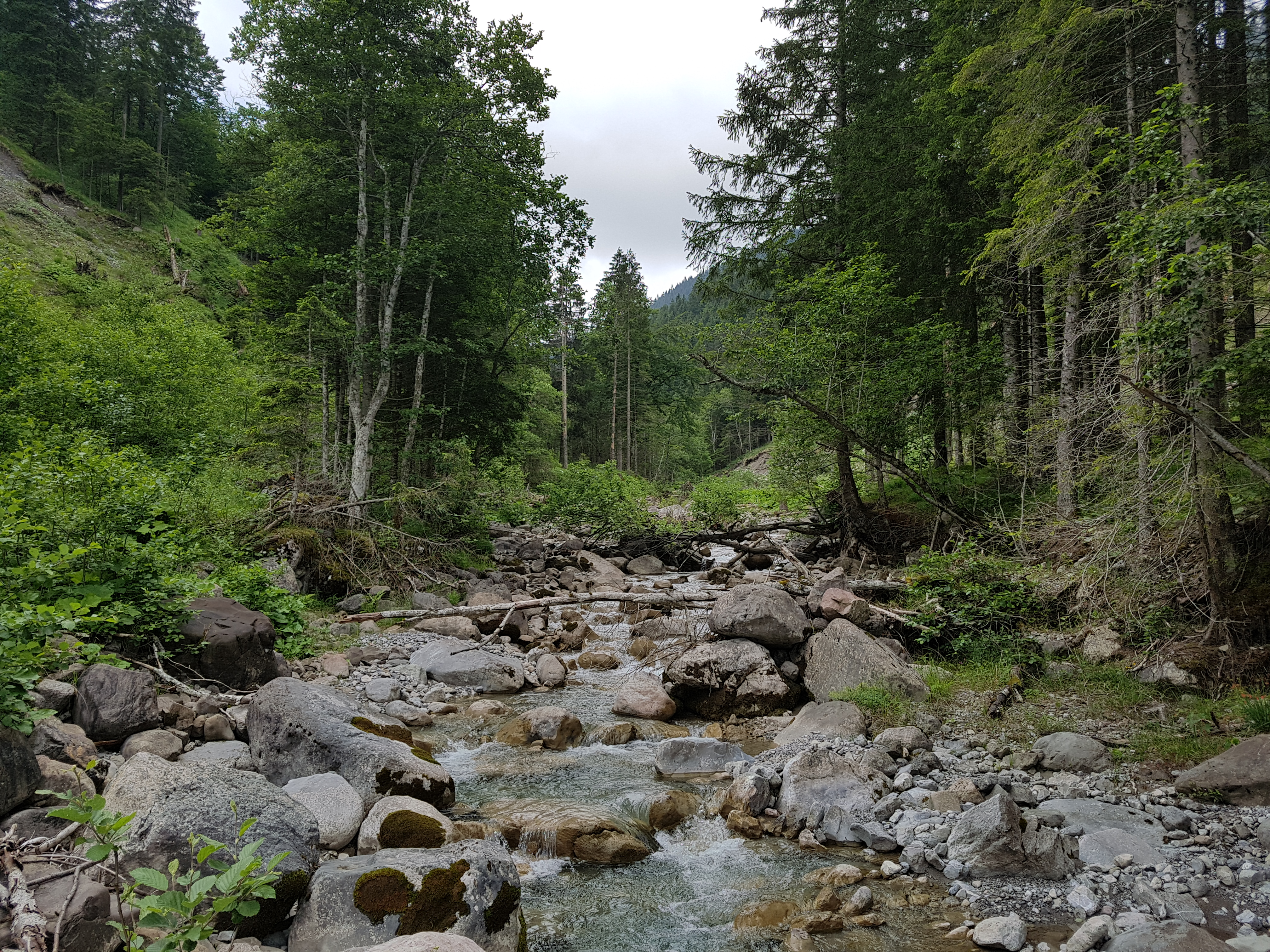 Samina in’n Noorden von Grosssteg, Liechtensteen